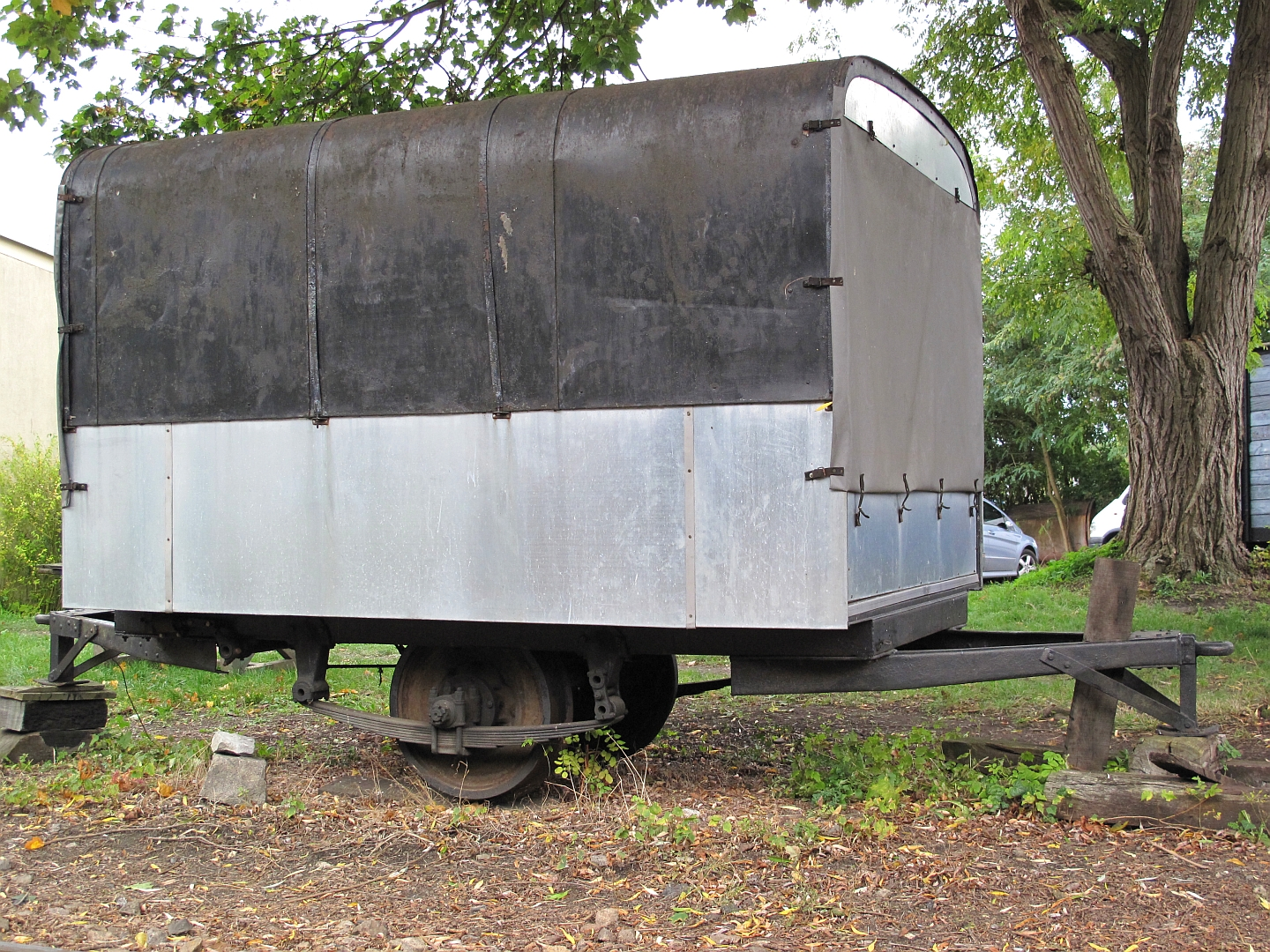 La remorque De Dion-Bouton NF 61 ex-CFD Lozère, au Musée des tramways à vapeur et des chemins de fer secondaires français, à Butry-sur-Oise le 3 octobre 2010.